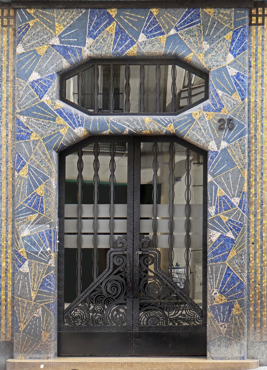 Une porte d'entrée rue d'Alsace La Maison Bleue est un immeuble d'habitation construit en 1929 à Angers. Le bâtiment est construit sur les plans de l’architecte Jusserand commandité par le maître d’ouvrage, Gabriel Créteau. Les décors ont été réalisés par Isidore Odorico. Il s'agit du premier immeuble avec ascenseur de la ville, c'est également un immeuble original dans le monde pour être l'un des bâtiments avec la plus grande façade recouverte de mosaïque dans le style Art déco. L'architecte, Jusserand, se serait inspiré des idées de Sauvage (l'architecte de la villa de Majorelle à Nancy). La construction débuta en 1927 pour se finir en 1929. Il se compose de 8 étages avec sous-sol2. Les matériaux utilisés sont le béton armé et le grès cérame pour réaliser les décors intérieurs et extérieurs en mosaïque. Les décors sont réalisés essentiellement en mosaïque par Isidore Odorico. La mosaïque de la Maison Bleue en fait une œuvre majeure dans l'histoire de l'art européen. Source Wikipedia et site d'Angers, ville d'art et d'histoire